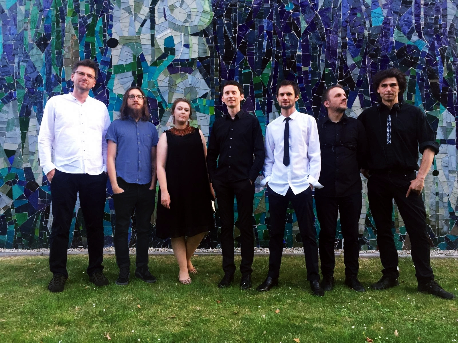 Zespół Tołhaje